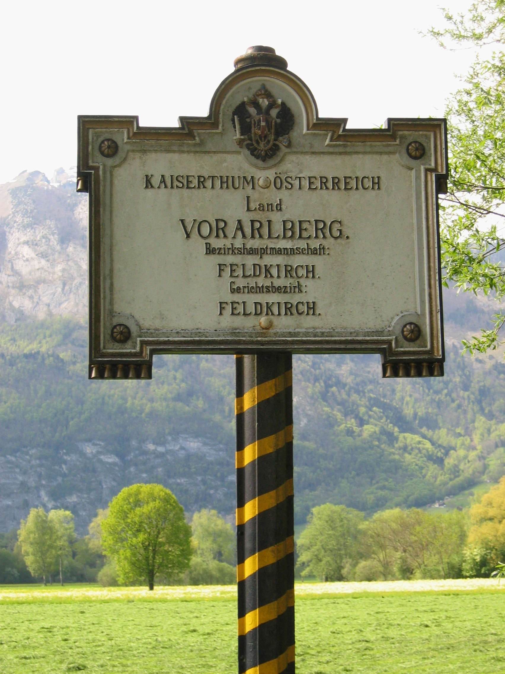 Bangs (Nofels) Alte Steinbrücke Bangser Feld Grenzuebergang nach Liechtenstein Tafel Kaiserthum Österreich